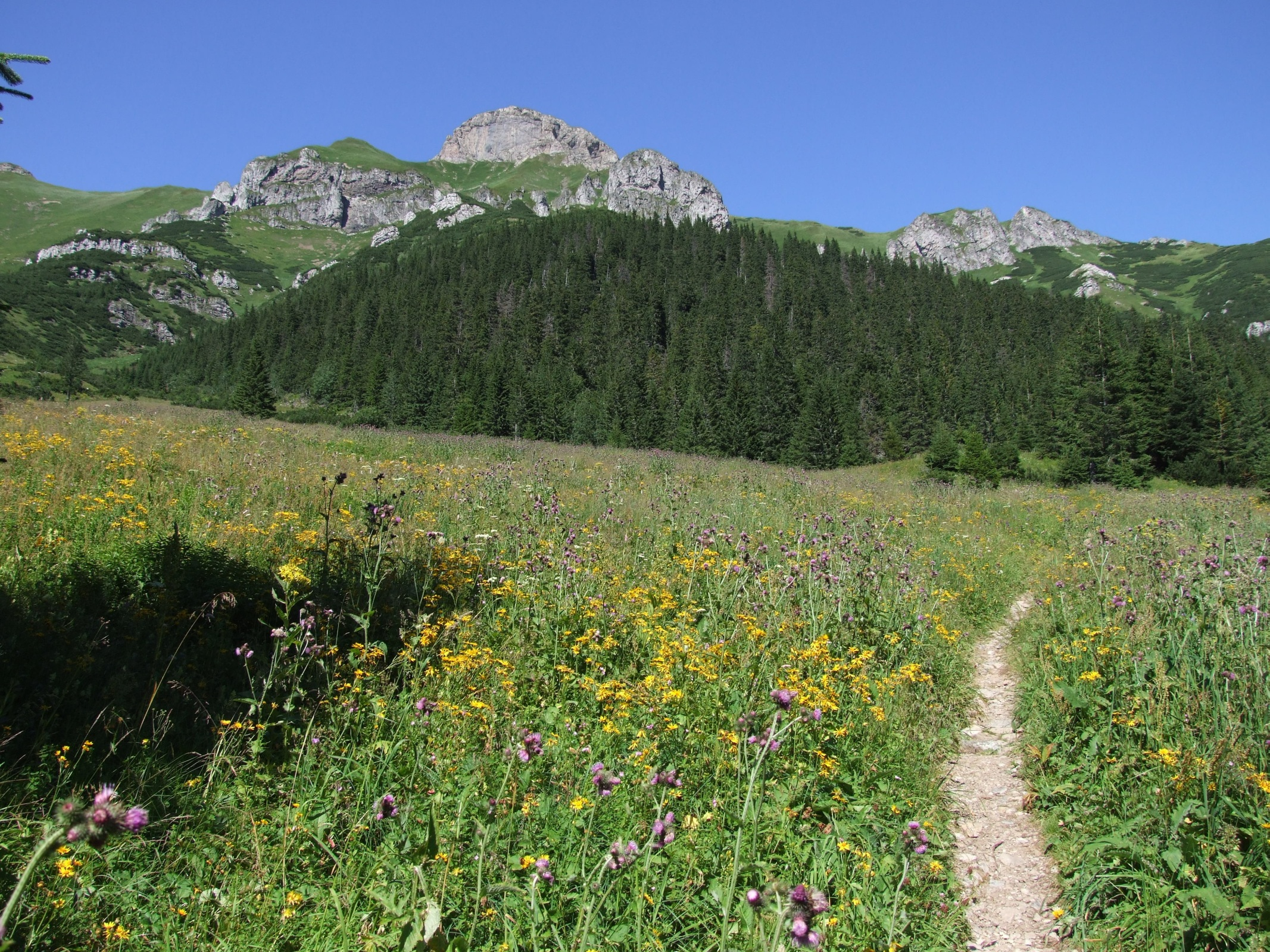 Polana na Dolinie Zadnich Koperszadów